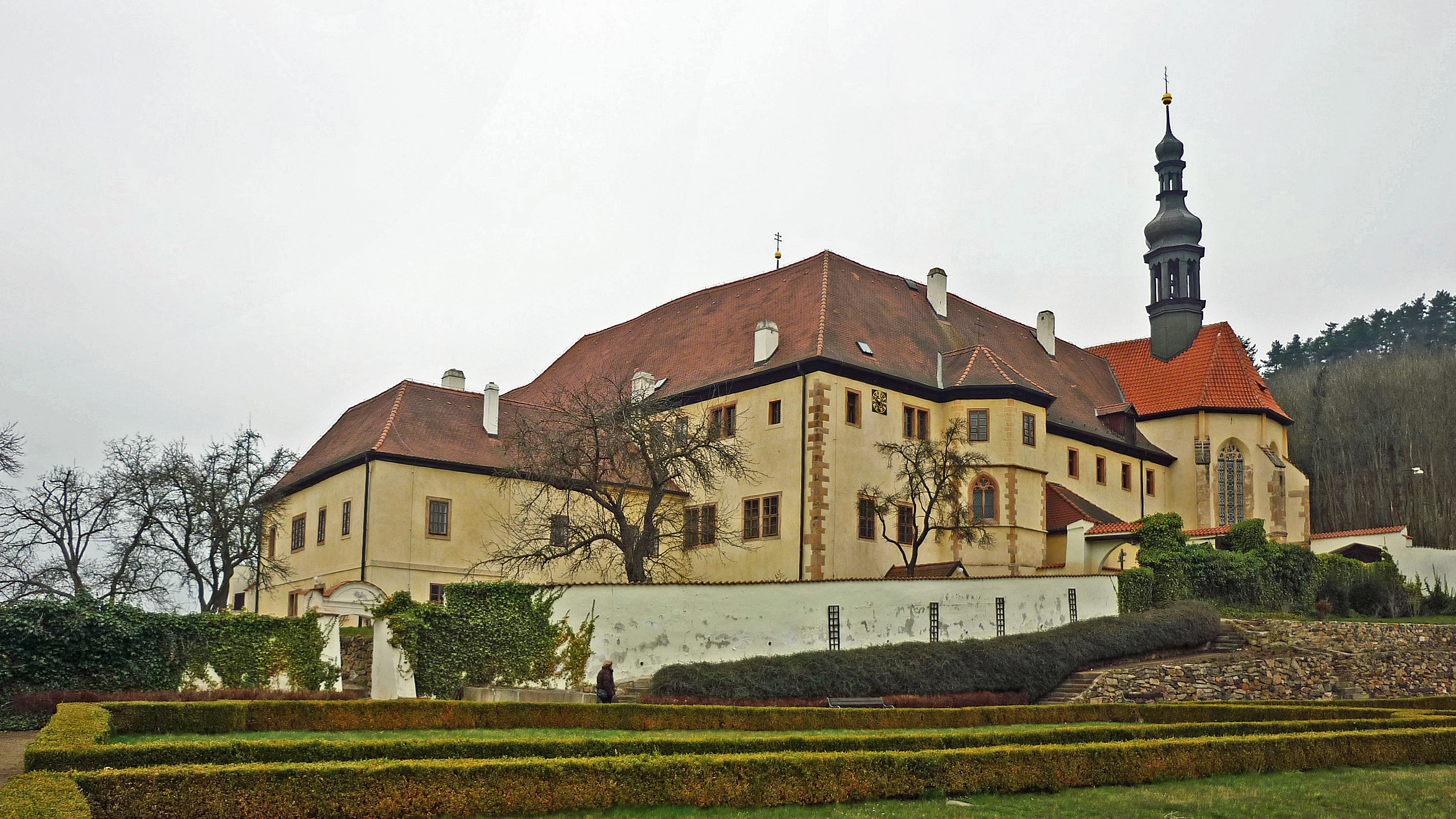 Ehemaliges Franziskanerkloster in Kaaden (Kadaň)